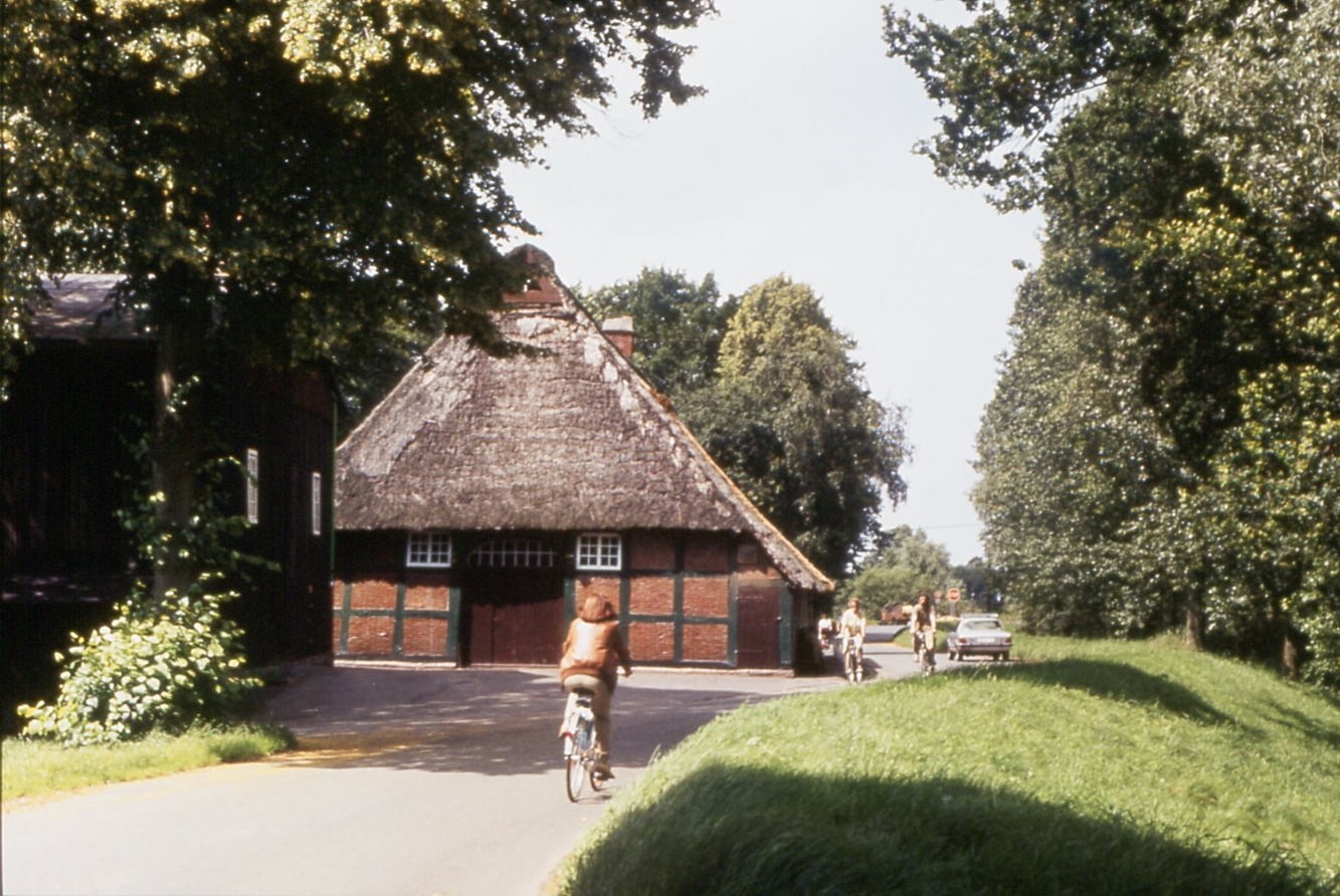 Zweiständerhof am Wümmedeich im Bremer Blockland A two-post Fachhallenhaus in Bremen's Blockland. North Germany.